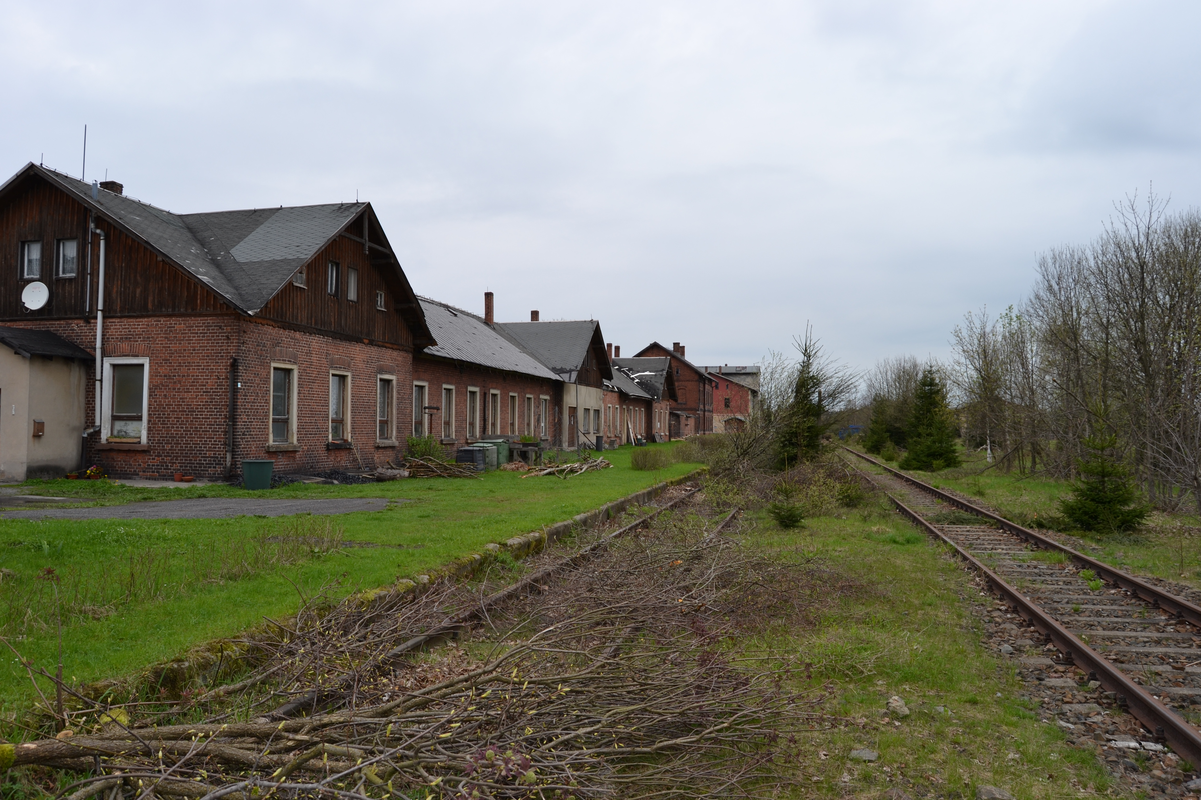 Blick auf einen Teil der stillgelegten Gleisanlagen sowie das ehem. Empfangsgebäude (links) des Bahnhofs Reitzenhain im Erzgebirge. Blick Richtung Flöha